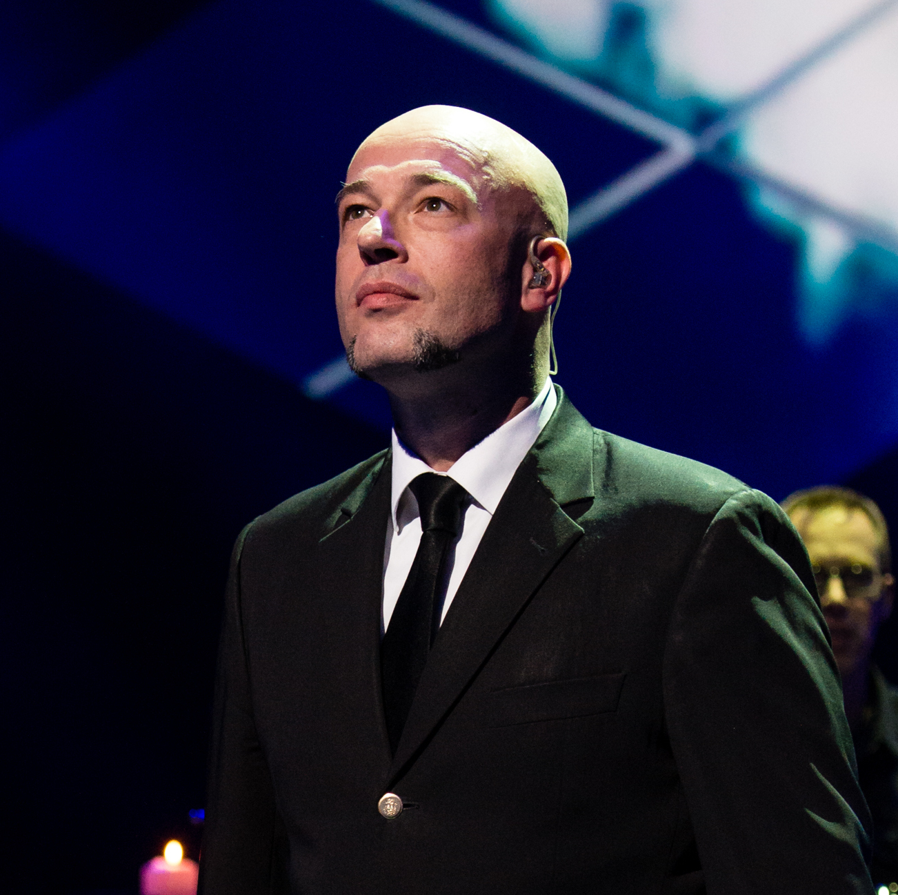 'Eurovision Song Contest 2014 - Unser Song für Dänemark': 'Unheilig'